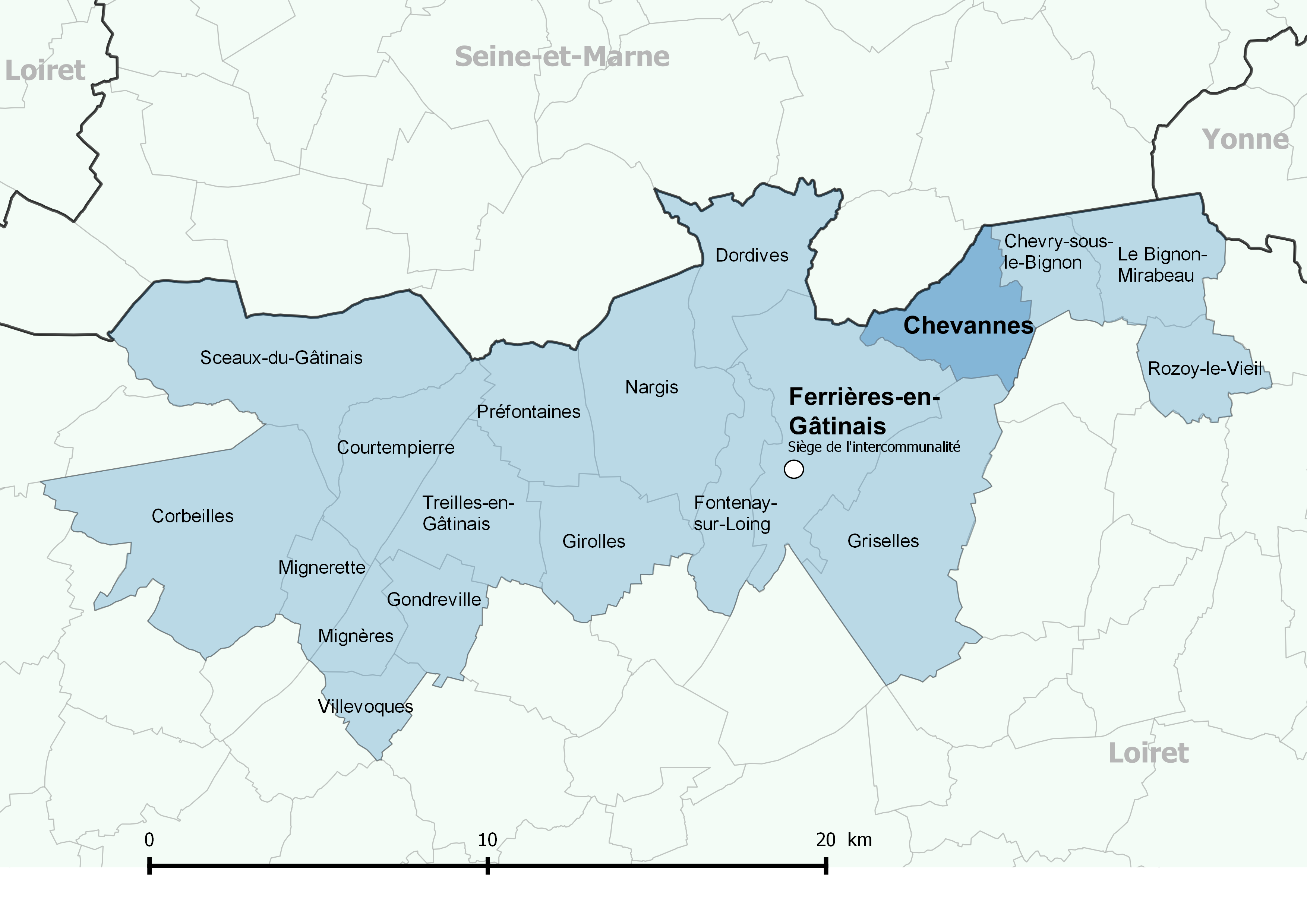 Périmètre de la communauté de communes des Quatre Vallées (Loiret) - Positionnement de la commune de Chevannes.